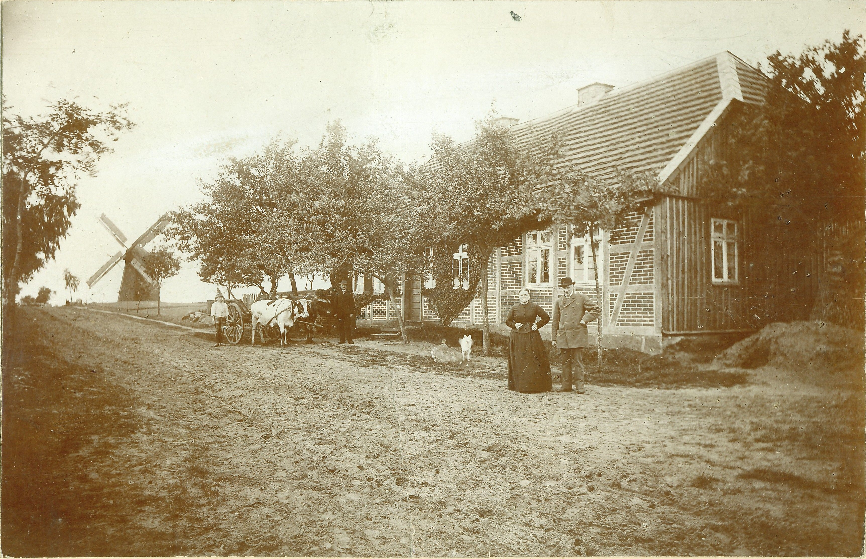 Zasenbecker Windmühle mit Müllerhaus und Müllerehepaar